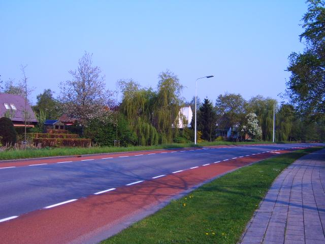 Lauwers, de rondweg van 'de Drait'.